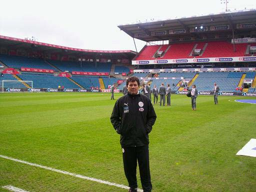 Gustavo Bobadilla